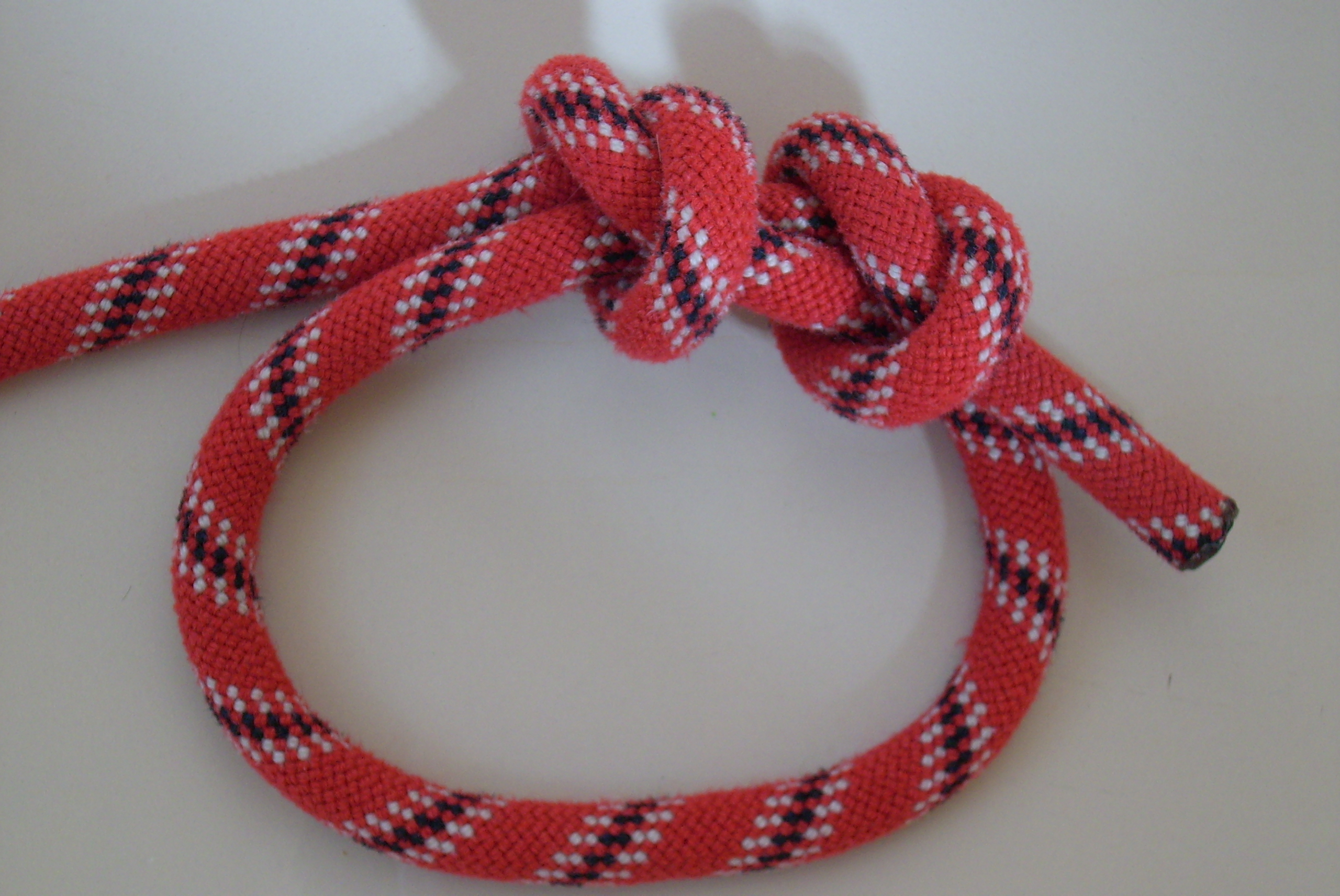 Spierenstich als Ring. So wurden früher Bergsteiger in der 2er-Seilschaft ins Bergseil eingebunden.